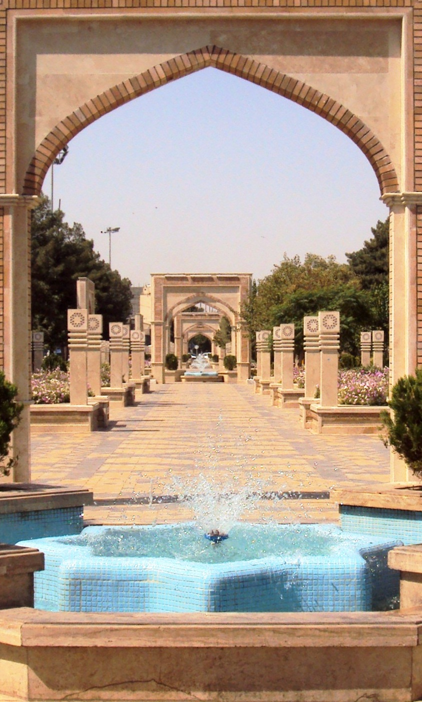 باغ‌راه بهار قم